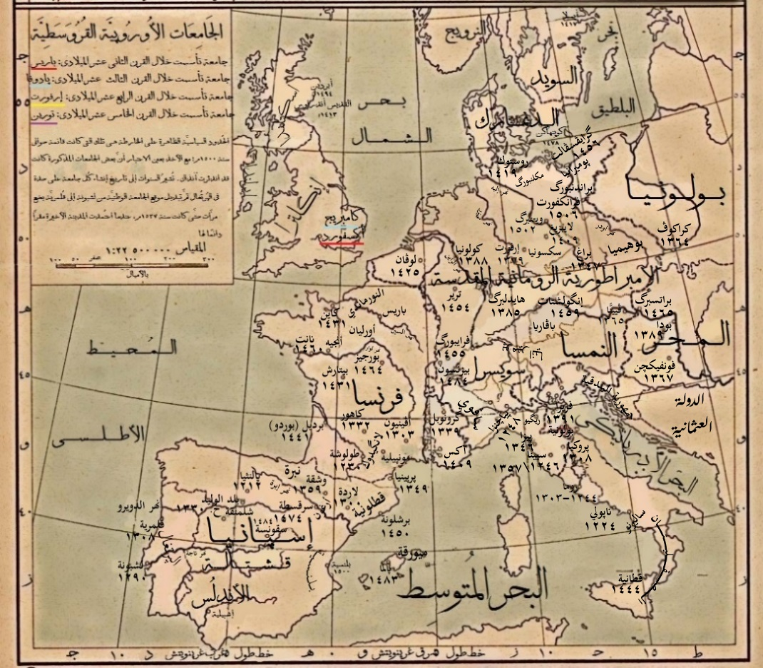 نسخة مُعرَّبة عن خريطة وضعها وليم شپيرد سنة 1923م، ونُشرت الأصليَّة في مُؤلَّف «الأطلس التاريخي».